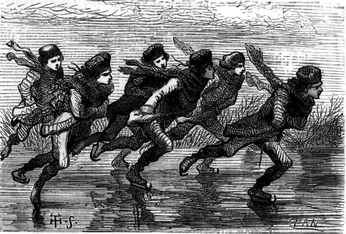 Les Patins d’argent, éditeur Hetzel et Cie, bibliothèque d’éducation et de récréation